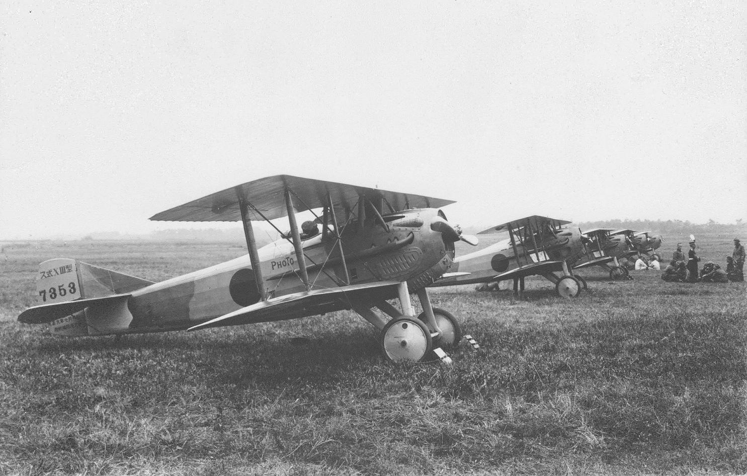 丙式一型戦闘機は、フランスから輸入したSPAD S.XIIIを日本陸軍で使用した戦闘機。